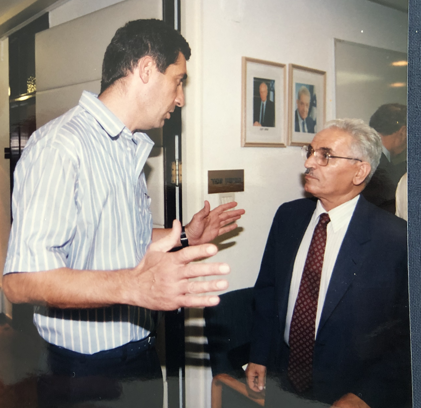 שר התחבורה ישראל קיסר מקבל הסבר מאלי רונן 1995.